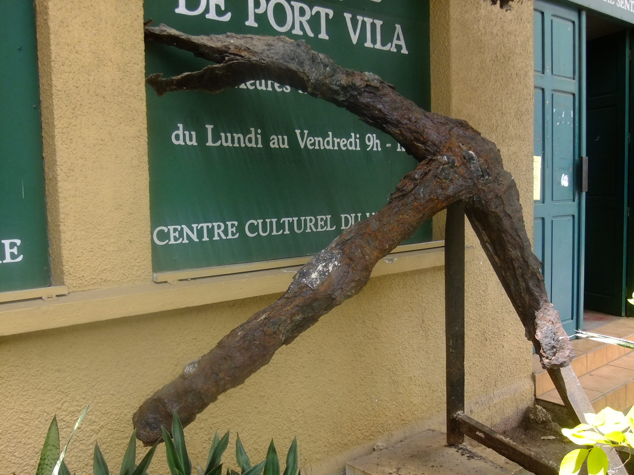 L'ancre de l'Astrolabe, exposée devant la bibliothèque de Port Vila. Selon un panneau voisin, elle a été retrouvée en 1958.